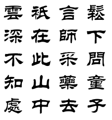 Sinogrammes dans le style scribe. Cette image reprend mot à mot le texte du poème en sigillaire de 賈島 Jiǎ Dǎo. Ce n'est pas l'œuvre d'un calligraphe mais un texte passé par une police de caractères spécifique.[1].